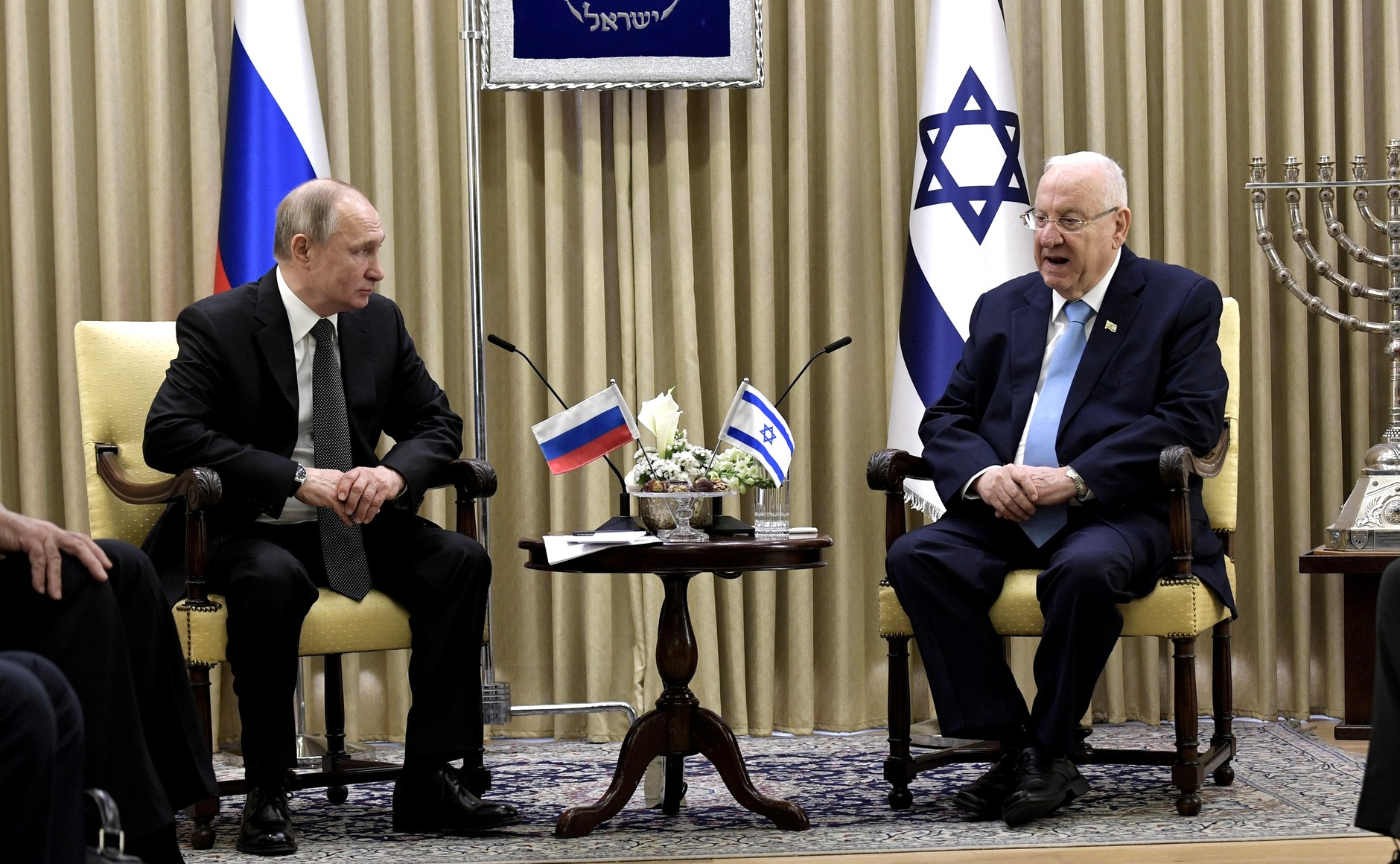 С Президентом Израиля Реувеном Ривлином.